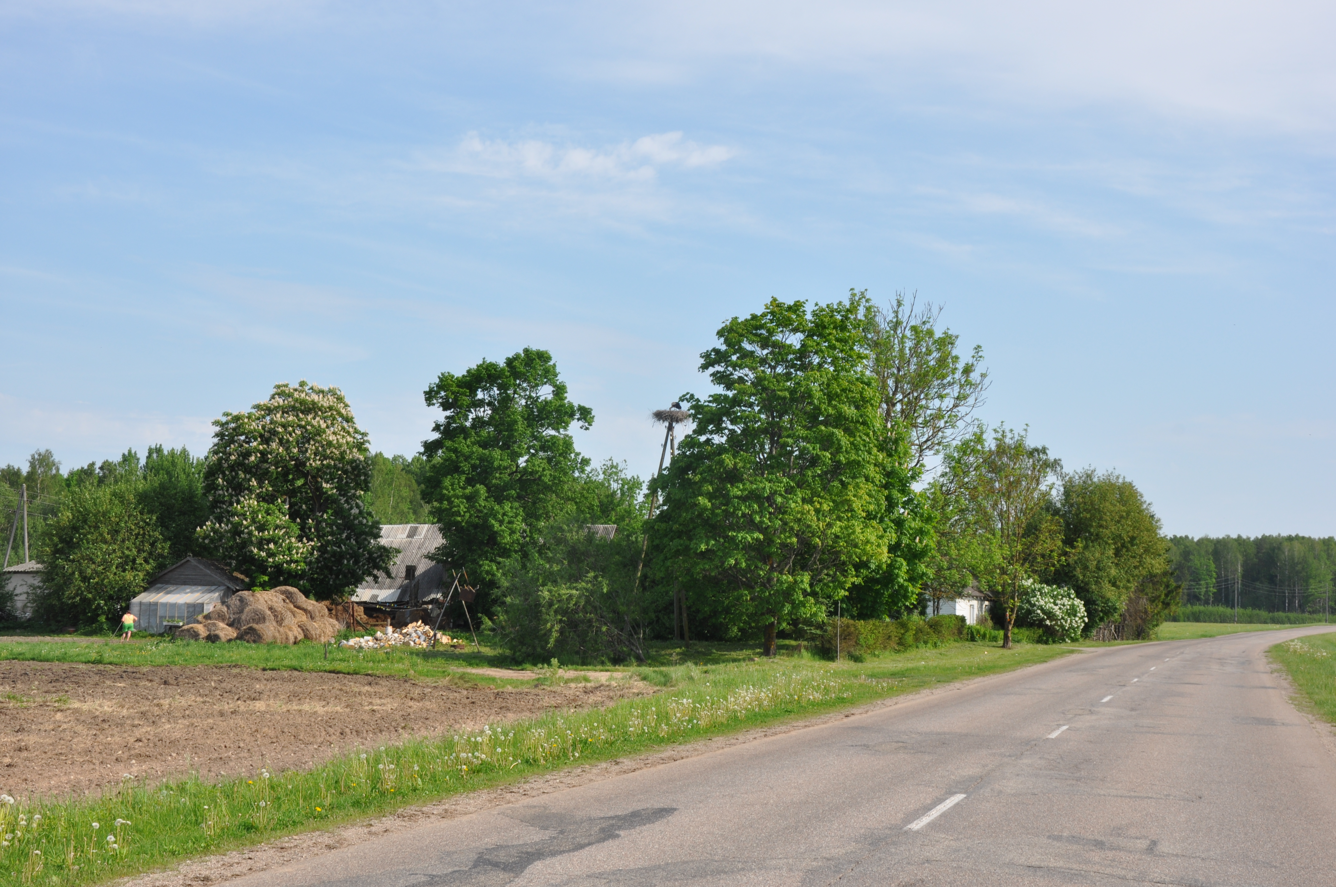 Baltā stārķa ligzda Nr.1140, ceļš P126, Laidzes pagasts, Talsu novads, Latvia